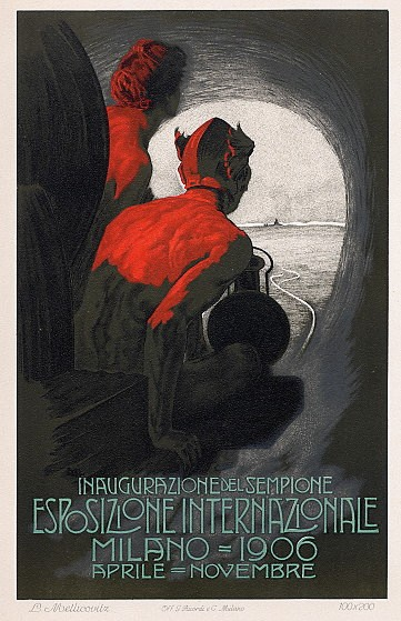 Poster ufficiale di Expo-Milano-1906 di Leopoldo Metlicovitz